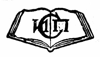 Эмблема института санитарного просвещения